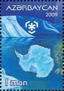 Qütb zonalarının və buzlagların qorunması